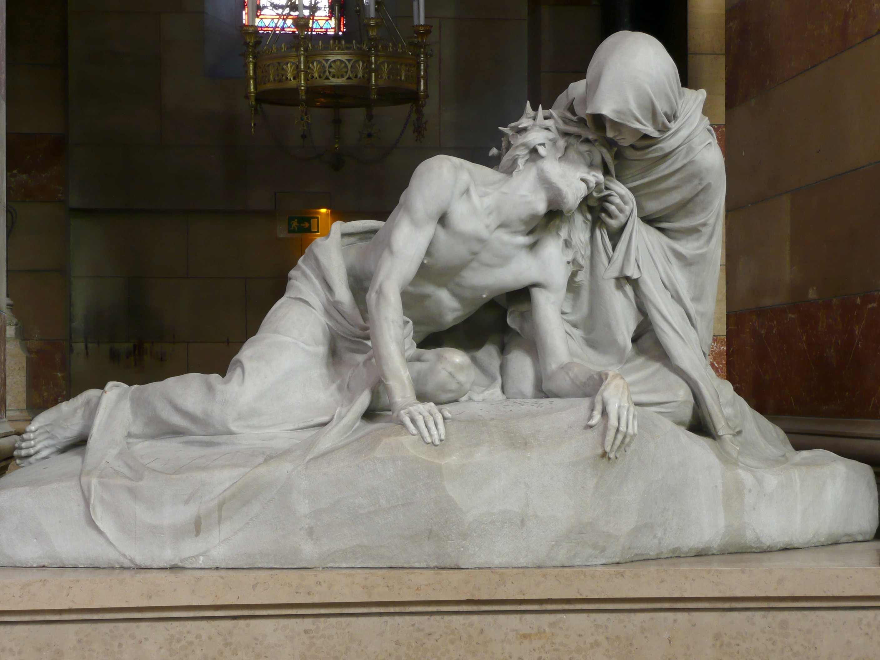 A Marseille (Bouches-du-Rhône, France), intérieur de la cathédrale Sainte-Marie-Majeure ou nouvelle Major par opposition à l'ancienne cathédrale romane juste à côté, groupe en marbre blanc sculpté en 1900 par le marseillais Auguste Carli représentant sainte Véronique essuyant le visage du Christ tombé à terre.